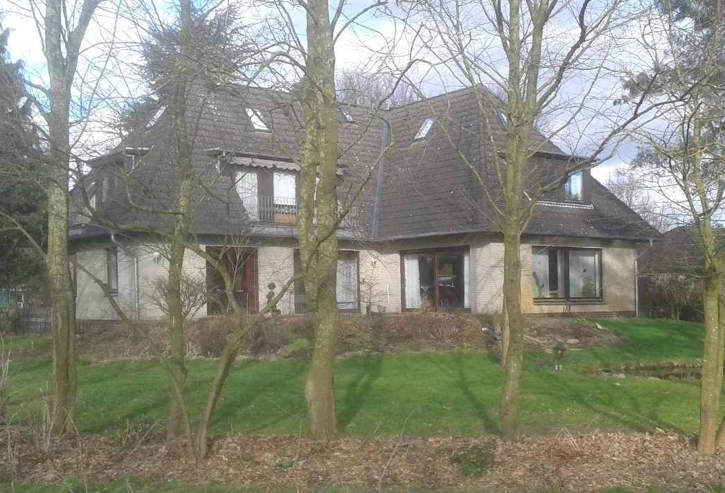 Haus von Hans Joachim Kauffmann, deutscher Dirigent, Komponist und Hochschullehrer